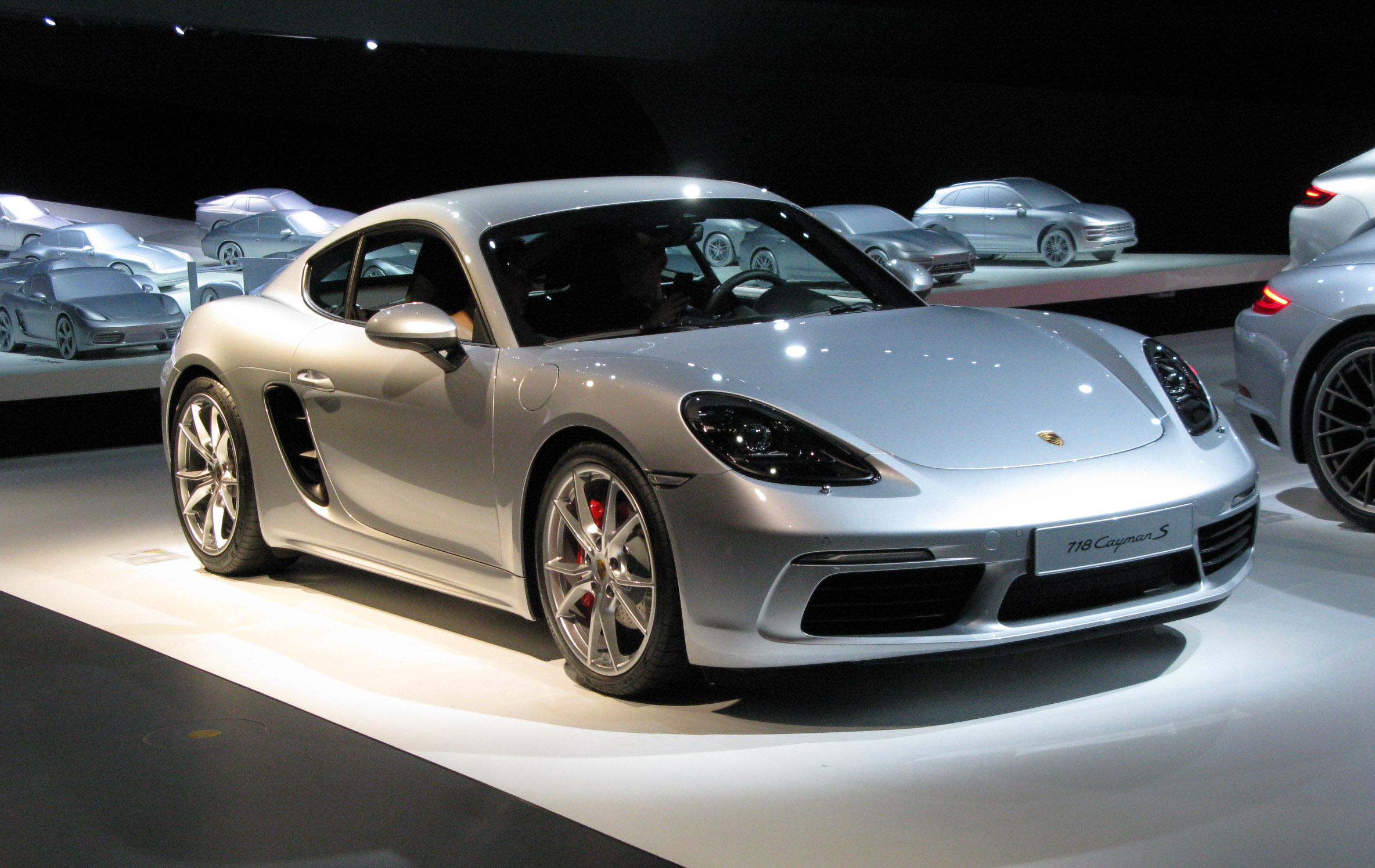 2017 Porsche 718 Cayman S